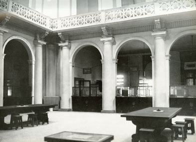 Sala del pubblico della Cassa di Risparmio di Mirandola nel 1912 circa